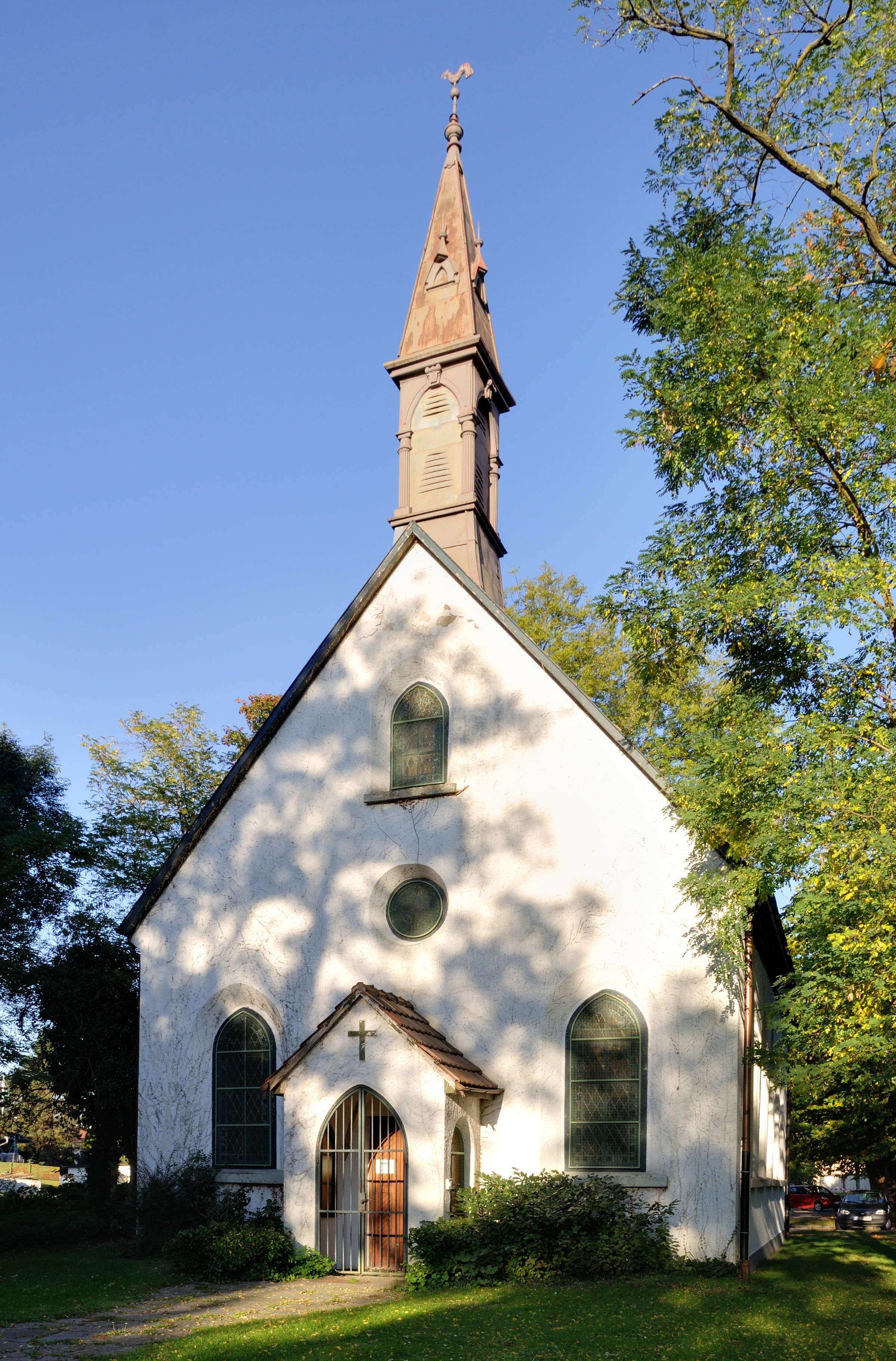 Rheinfelden: Adelberger Kirche